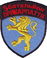 Емблема 5-го батальйону ТрО ЗСУ «Прикарпаття» Івано-Франківської області.